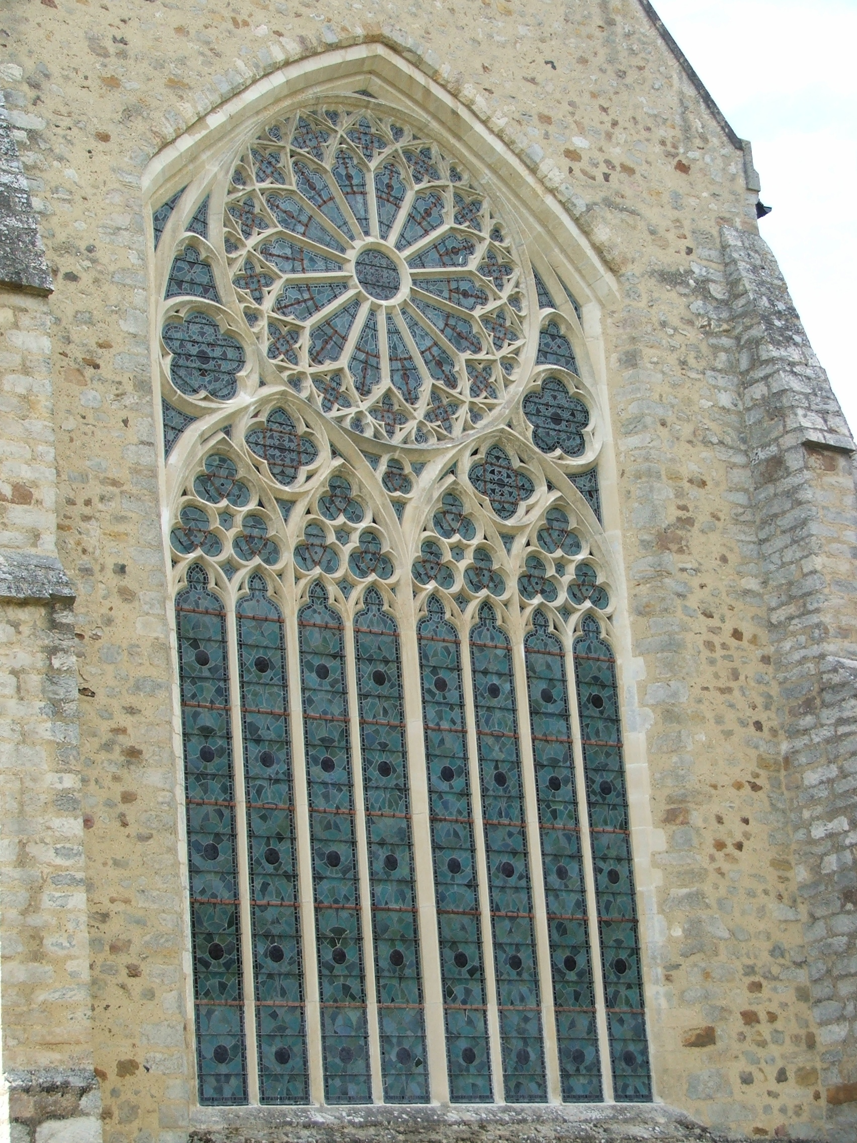 Vue dérrière l'abbatiale, dans les jardins de l'abbaye de l'Epau.